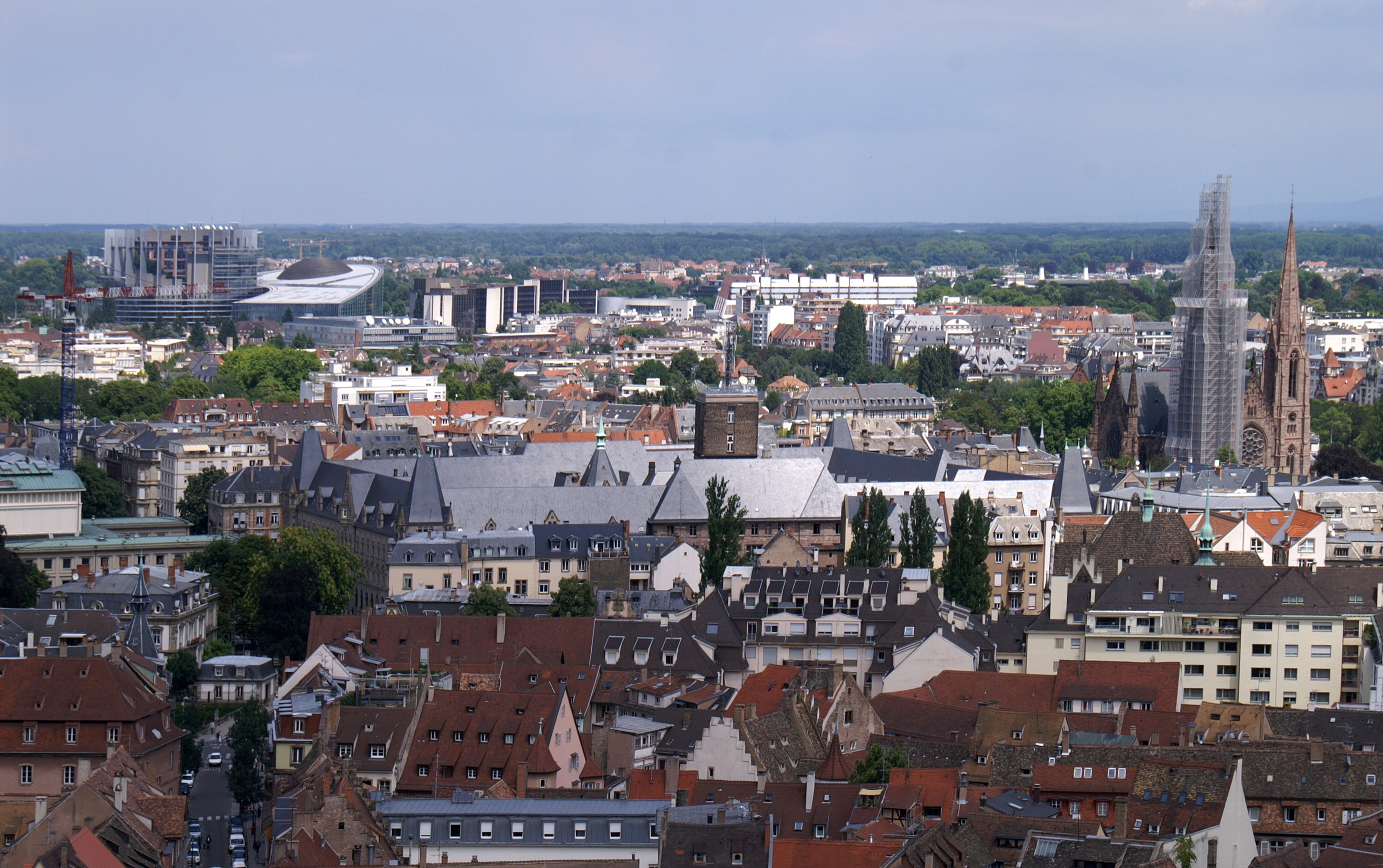 Alsace, Bas-Rhin, Strasbourg, Vue de la Cathédrale: Quartiers de l'Europe, Saint-Paul.